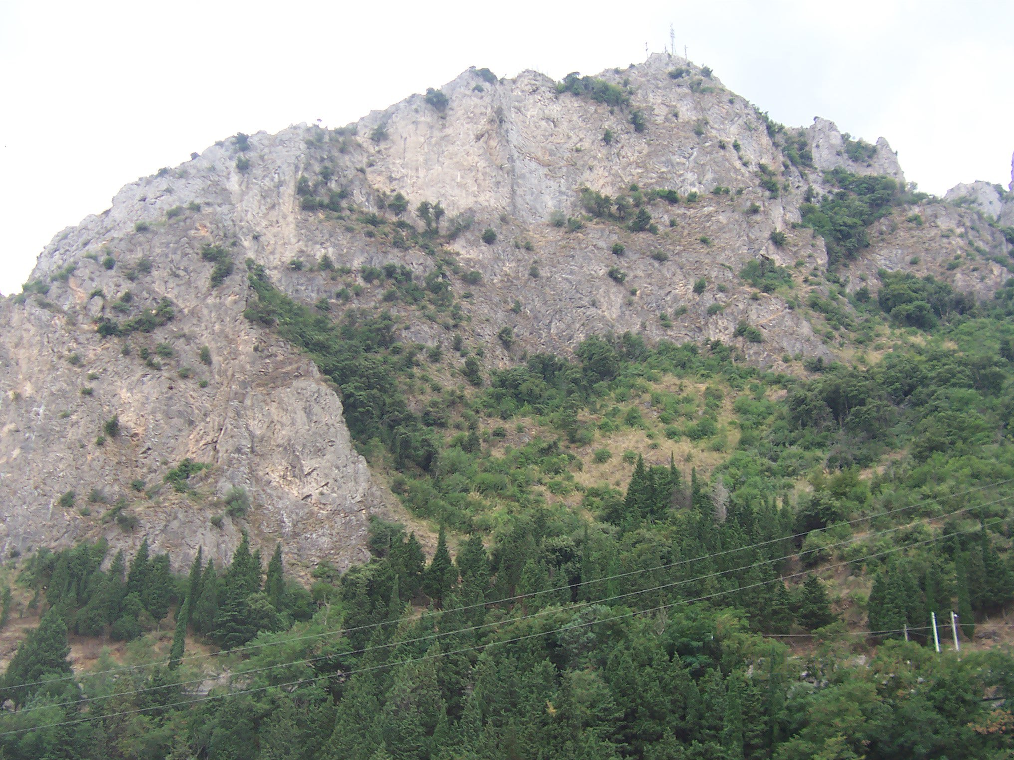 Veduta di Monte Stella da Pazzano